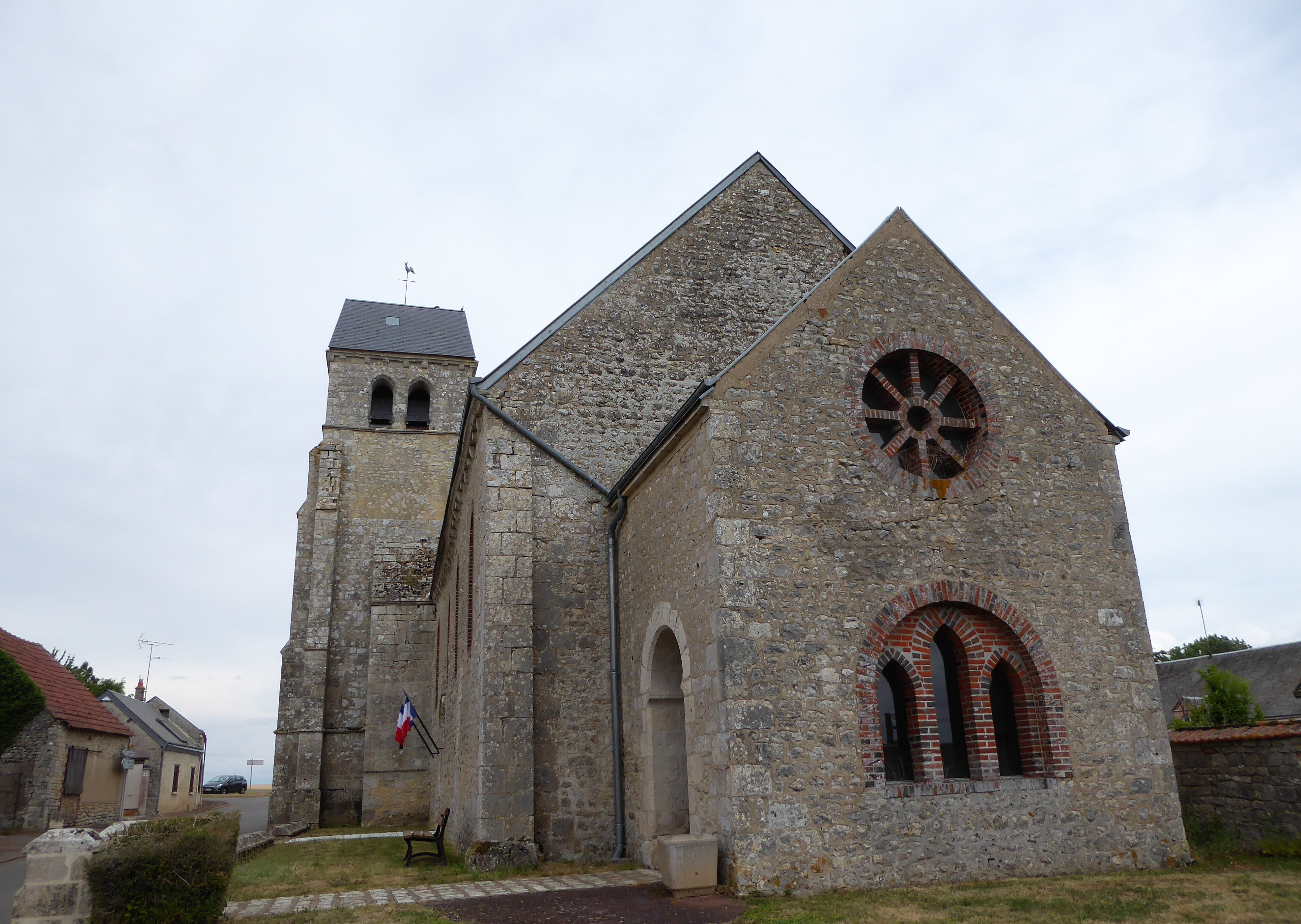 caquetoire de la façade ouest, église Saint-Sulpice, Courbehaye, Eure-et-Loir, France.